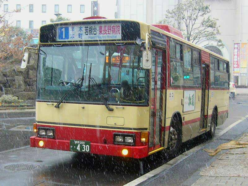 登録番号：長野200か・430 長電バス所属